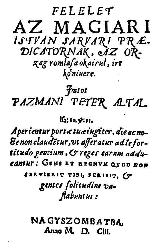 title of book Felelet az Magyari Istvan